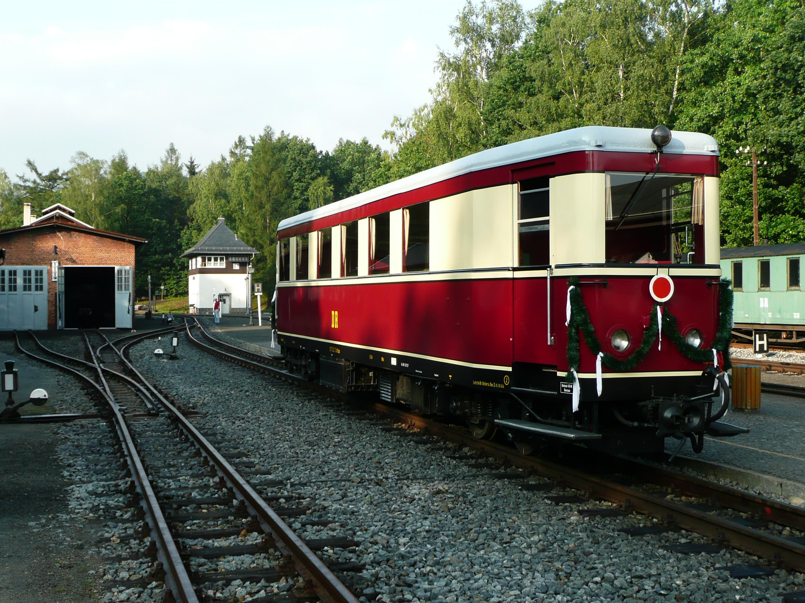 VT 137.322 zur Einweihungsfahrt im Bahnhof Bertsdorf